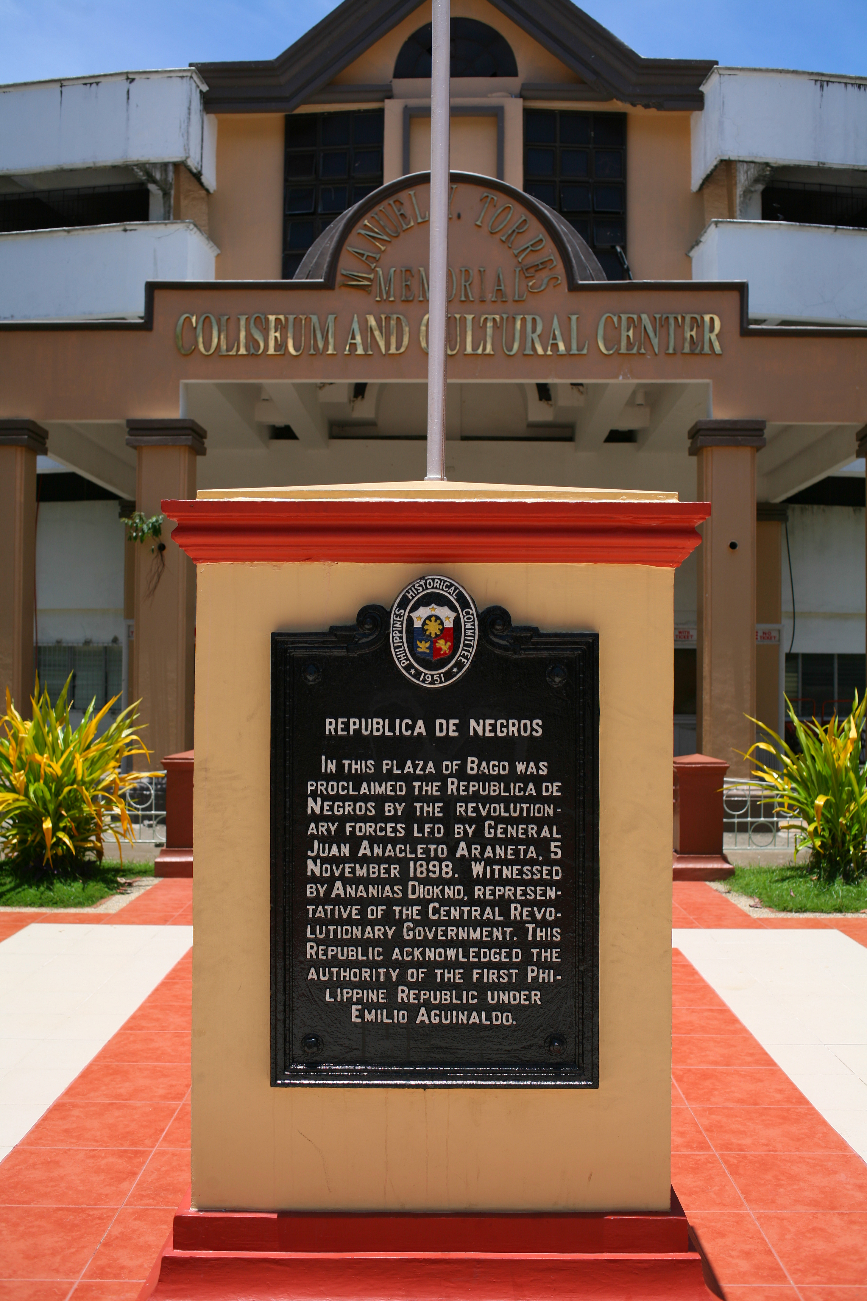 Targa a ricordo della Repubblica di Negros a Bago, Negros Occidental, Filippine